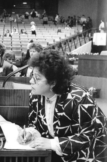 Title: Berlin, XII. DFD-Kongress People in the image: Steineckert, Gisela: Schriftstellerin, Vorstandsmitglied des Schriftstellerverbandes, DDR Factual corrections and alternative descriptions are encouraged separately from the original description. Additionally errors can be reported at this page to inform the Bundesarchiv. Original historic description: ADN-ZB Grimm 6.3.87-kb- Berlin: XII. DFD-Kongreß Die kürzlich mit dem DFD-Literaturpreis ausgezeichnete Berliner Schriftstellerin Gisela Steineckert (r.) war begehrter Gesprächspartner während der Beratungspausen auf dem Bundeskongreß des DFD im Palast der Republik.